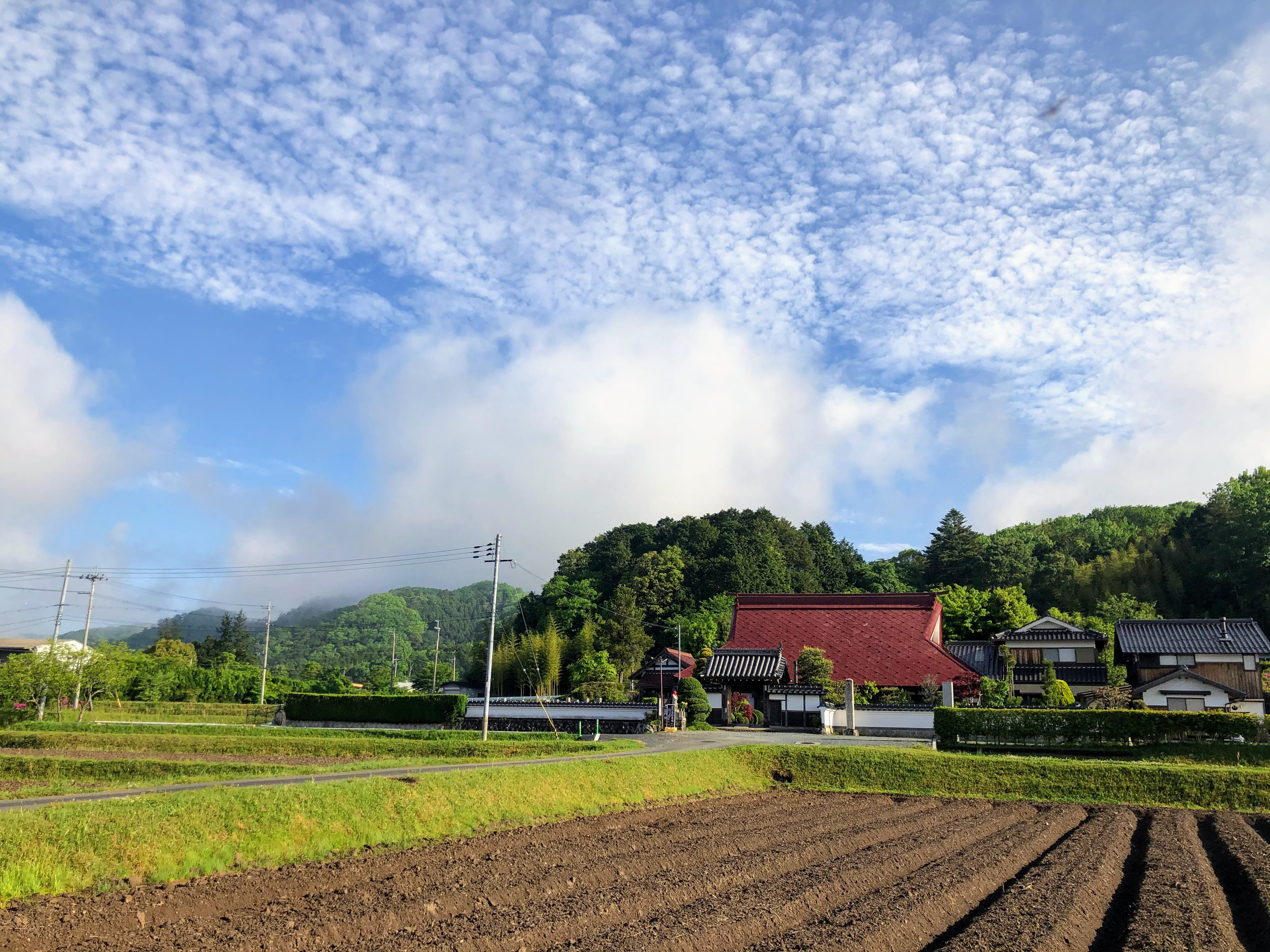 曹洞宗長楽寺全景